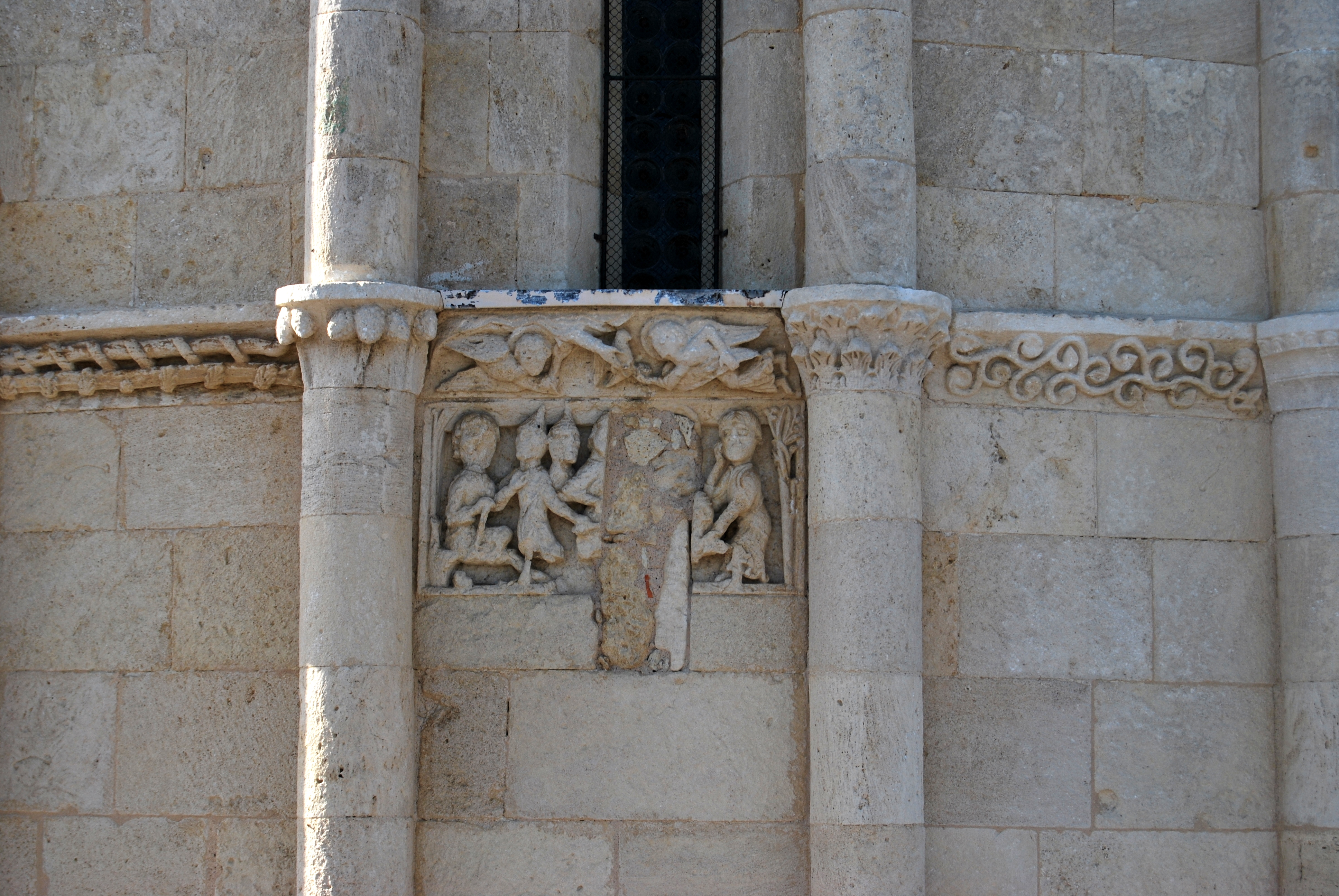 Église Saint-Quentin de Baron (Gironde)